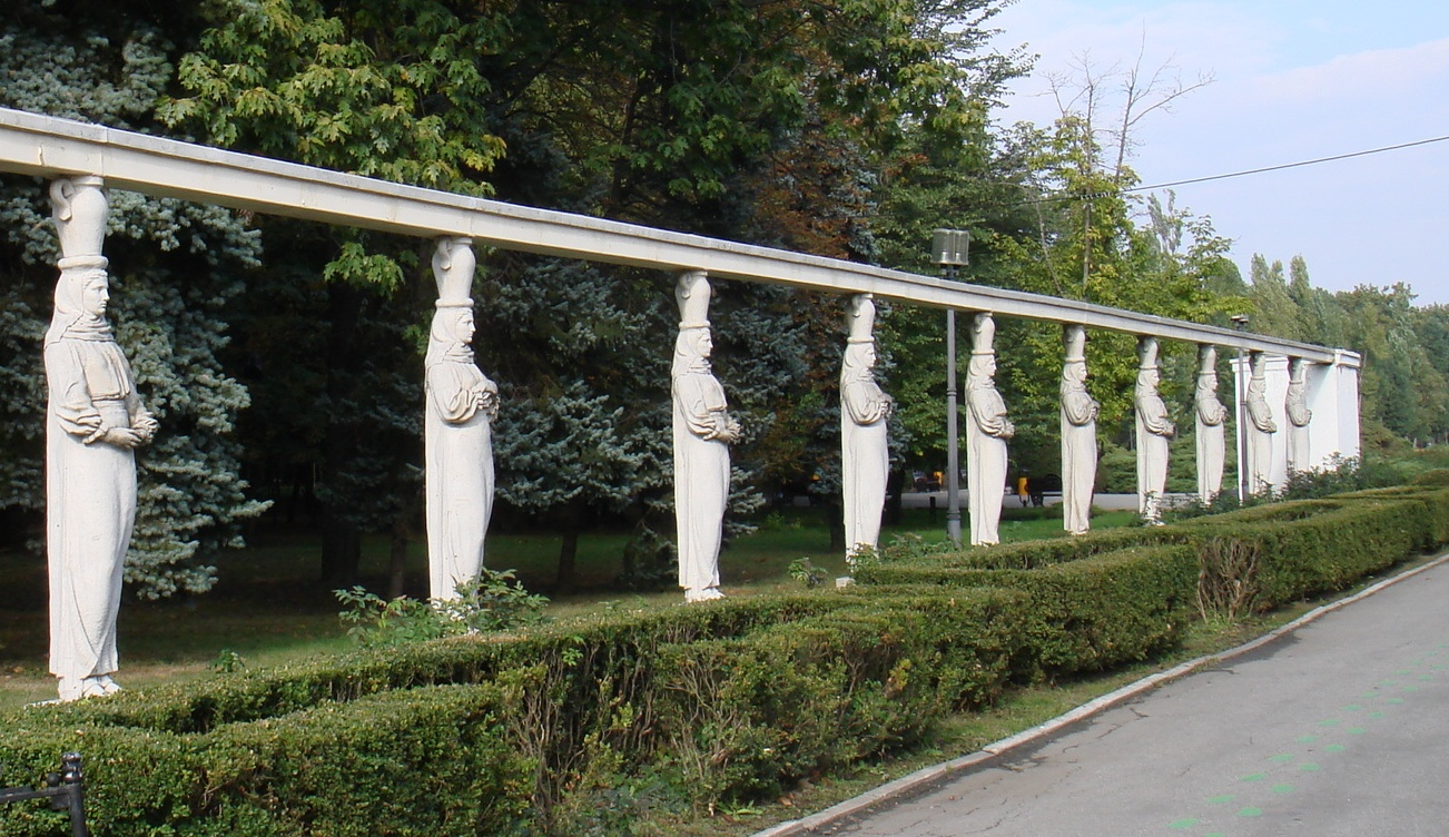 Aleea Cariatidelor, din Parcul Herăstrău, de Constantin Baraschi (17 noiembrie 1902 – 22 martie 1966) și constă din două șiruri de câte 10 statui pe fiecare parte a aleii. Statuile reprezintă țărănci românce îmbrăcate în port popular și purtând pe cap un ulcior. Țărăncile reprezentate sunt de două feluri care diferă între ele prin poziția mâinilor. Lucrarea a fost amplasată în Herăstrău în 1936 dar ceea ce vedem noi azi nu este originalul, distrus în anii cinzeci pentru a face loc statuii lui Stalin, ci o reconstituire realizata de sculptorul Ionel Stoicescu, in anul 2006, pe baza fotografiilor de epoca si a unei cariatide originale gasite in cimitirul Bellu in 2006.